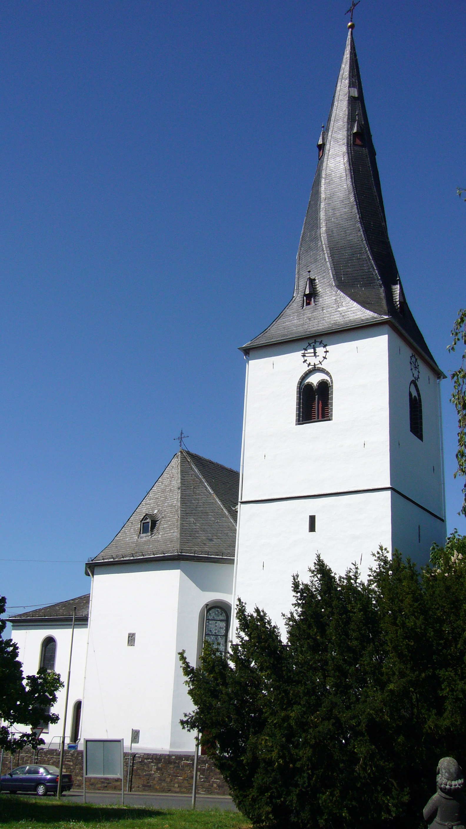 St. Margarethen-Kirche im Stadtteil Heimbach-Weis (Neuwied)